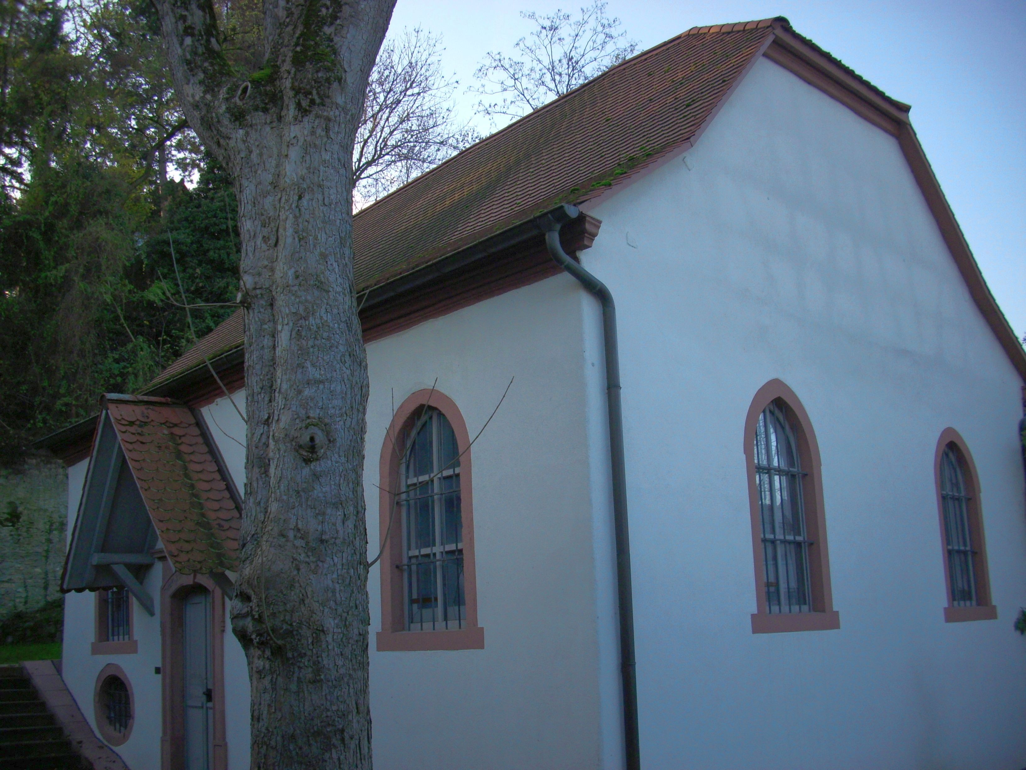 Kleiner Putzbau, Fachwerkgiebel, Krüppelwalmdach, mit Hochzeitsstein, 1736/37; Mikwen aus dem 18. und 19. Jahrhundert